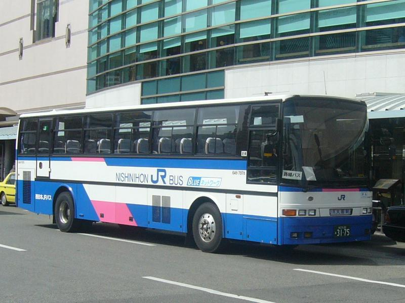 登録番号：なにわ22か31-75 西日本JRバス所属「阿波エクスプレス大阪号」用